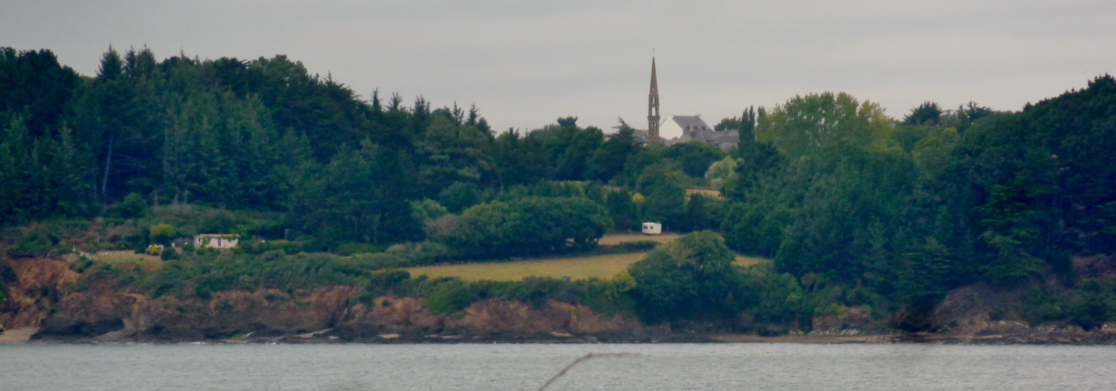 Logonna-Daoulas vu du Bois du Loc'h en Landévennec